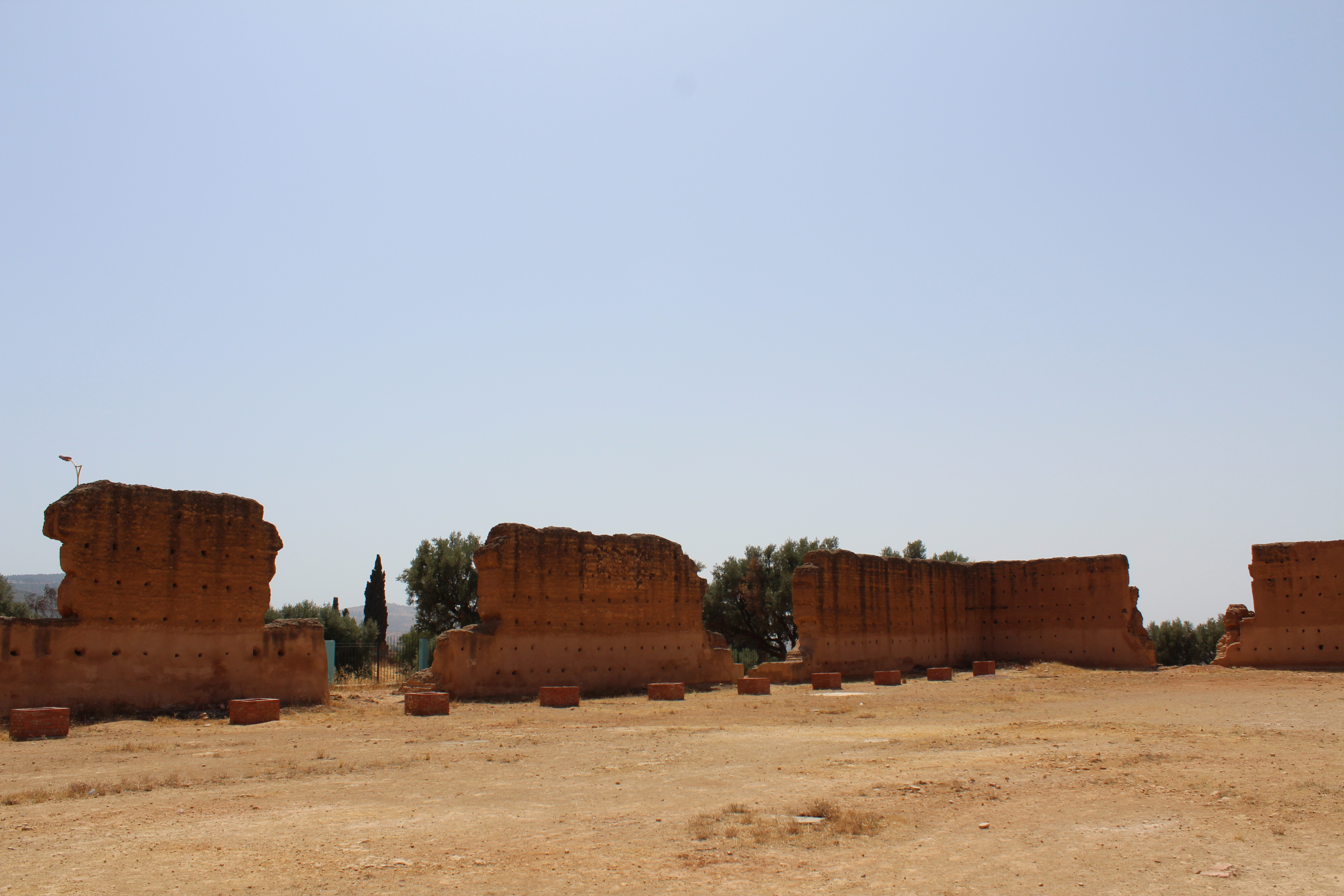 Colonnes provenant de la mosquée de Mansourah, (Classé, 1900)